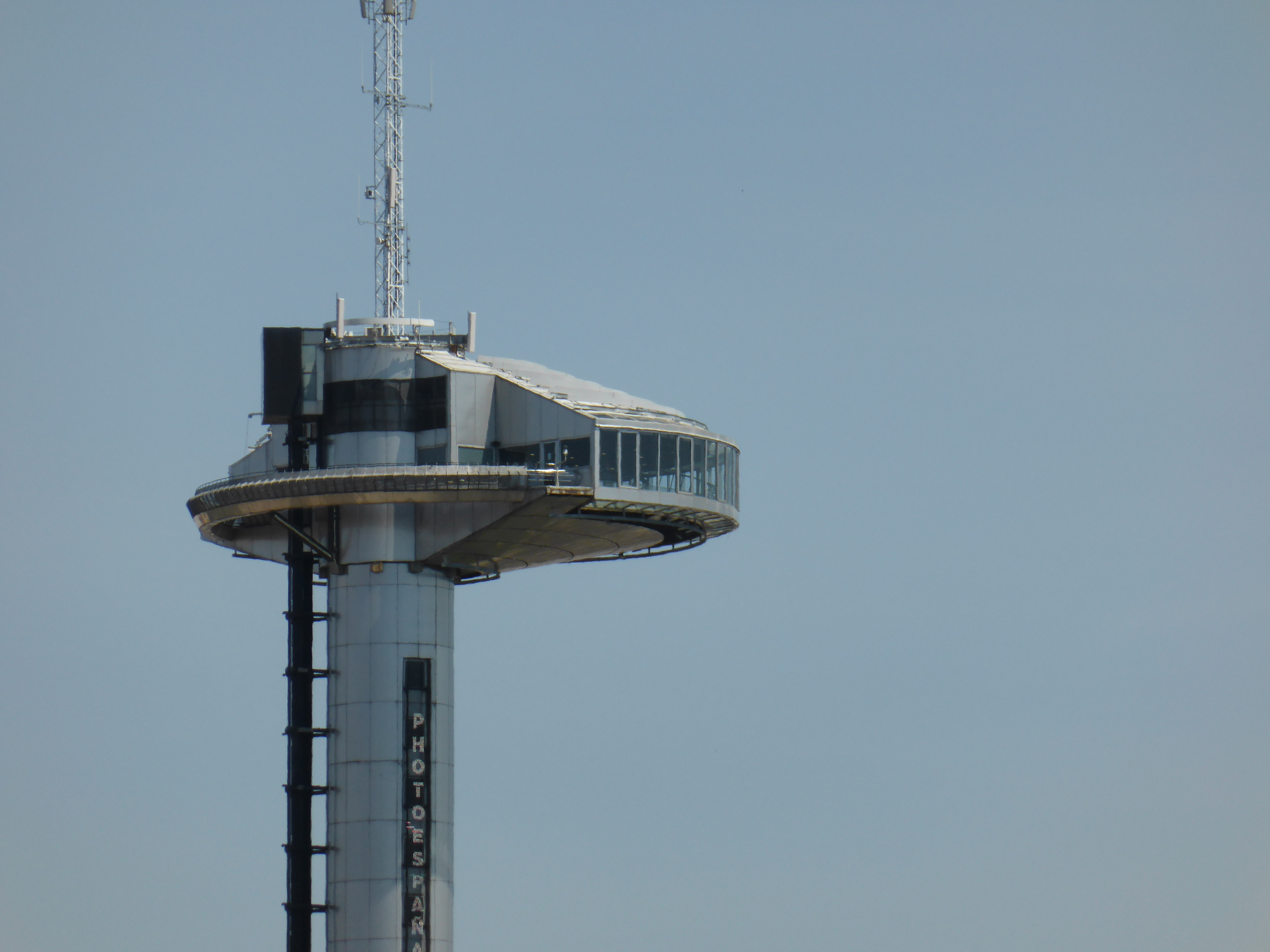 Parte alta del Faro de Moncloa, con el mirador turístico, acristalado. También vemos antenas y el nuevo segundo ascensor (a la izquierda).